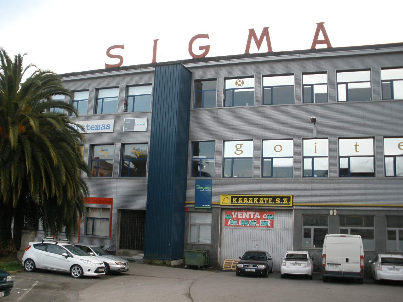 Fábrica de máquinas de coser Sigma, en Elgoibar (Gipuzkoa)